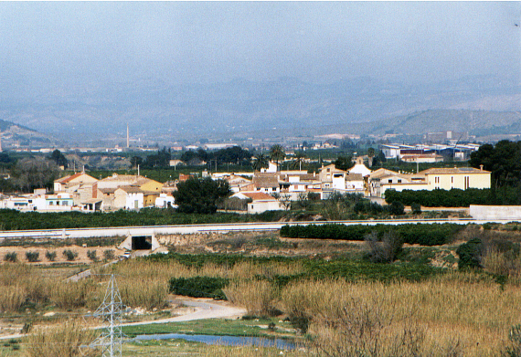 Panoràmica del poble des d'Aiacor